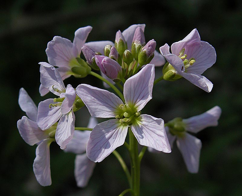 Wiesen-Schaumkraut (Cardamine pratensis), aufgenommen im Schiffenberger Wald in der Nähe von Gießen